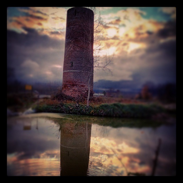 این تصویر نشان دهنده وضعیت مناره در زمان حال و بعد از باز سازی میباشد